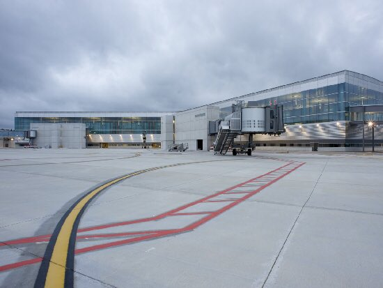 vista general de la plataforma de aviación comercial del aeropuerto de Santiago de Compostela